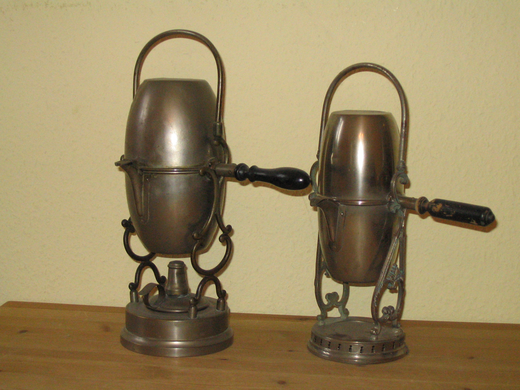 Filterkaffeemaschine aus Deutschland um 1880. russisches Ei, oder Potsdamer Boiler genannt